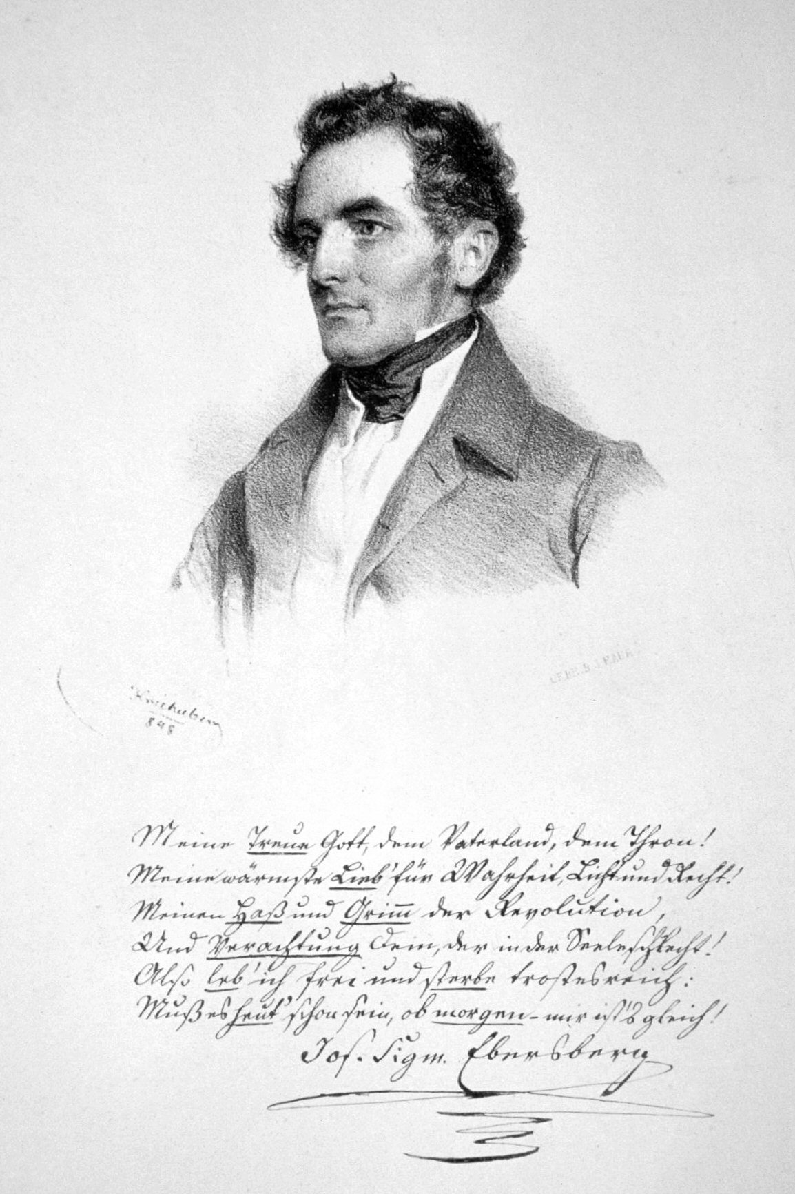 Josef Sigmund Ebersberg, Lithographie von Josef Kriehuber, 1848. Text unter dem Bild, laur Wurzbach: „Meine Treue Gott, dem Vaterland, dem Thron! Meine wärmste Lieb’ für Wahrheit, Licht und Recht! Meinen Haß und Grimm der Revolution Und Verachtung dem, der in der Seele schlecht! Also leb’ ich frei und sterbe trostesreich: Muß es heut schon sein, ob morgen – mir ist’s gleich! Jos. Sigm. Ebersberg.“